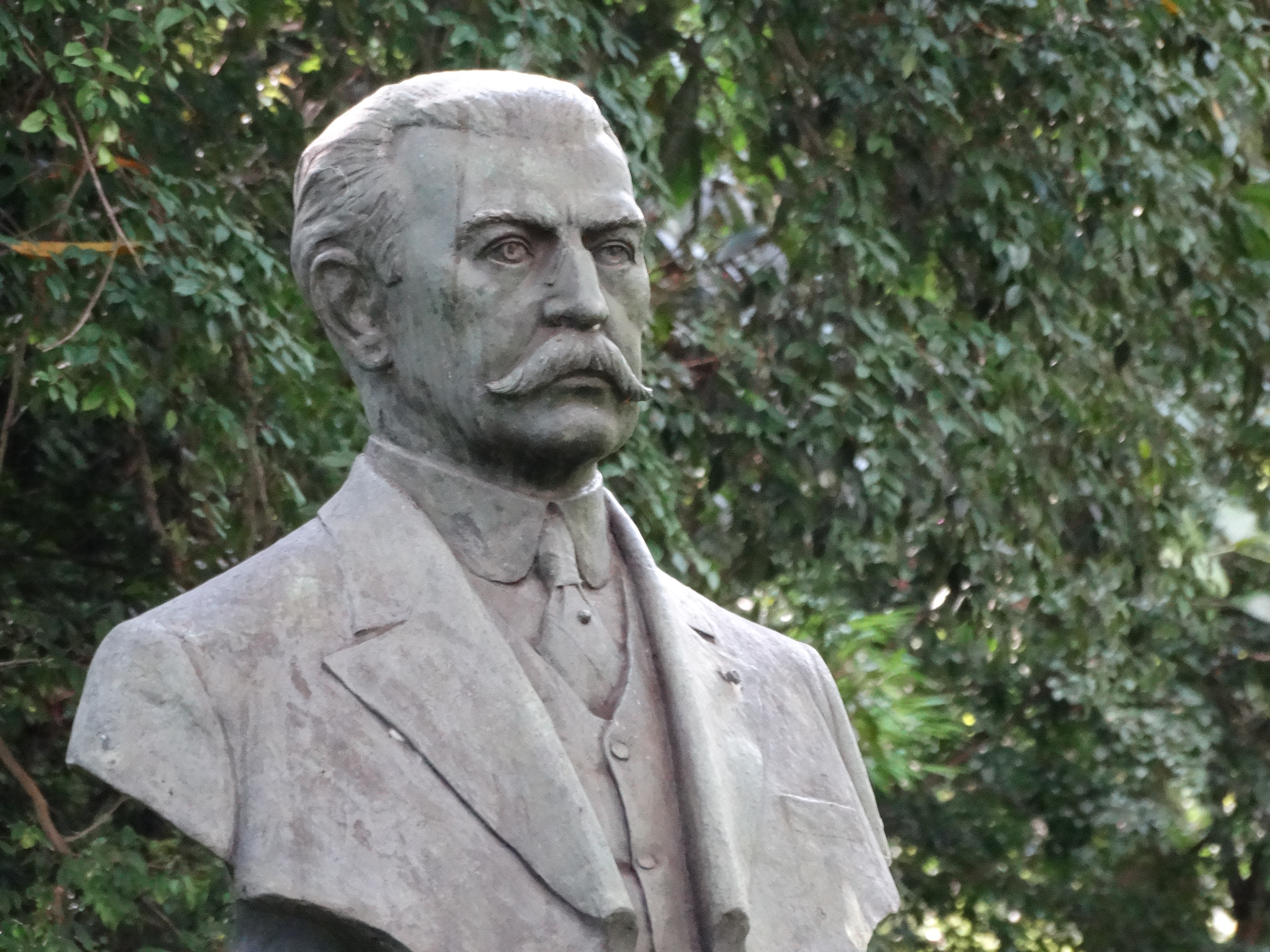 Vista lateral do busto de Firmiano Pinto, localizado no Parque Buenos Aires, em São Paulo, Brasil. 03